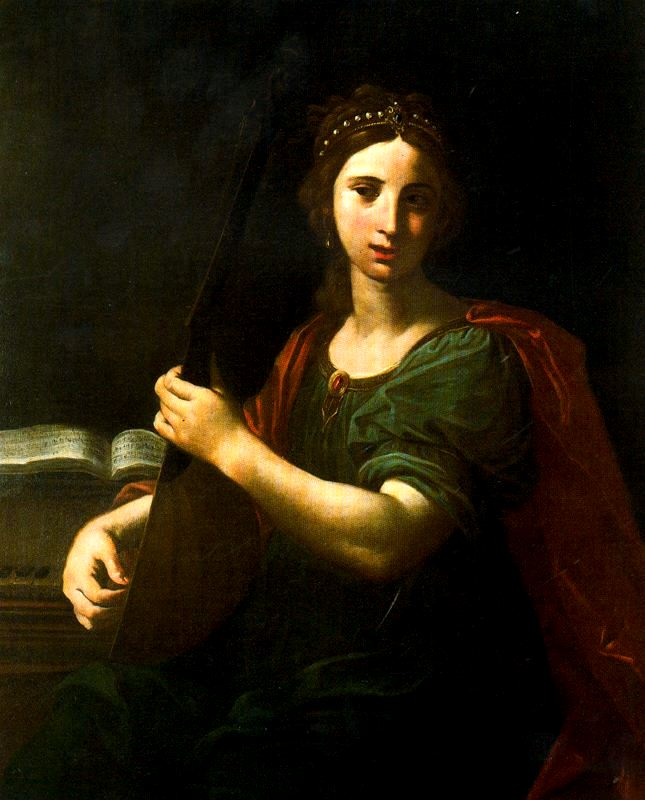 Tañedora de laudtitle QS:P1476,es:"Tañedora de laud" label QS:Les,"Tañedora de laud"